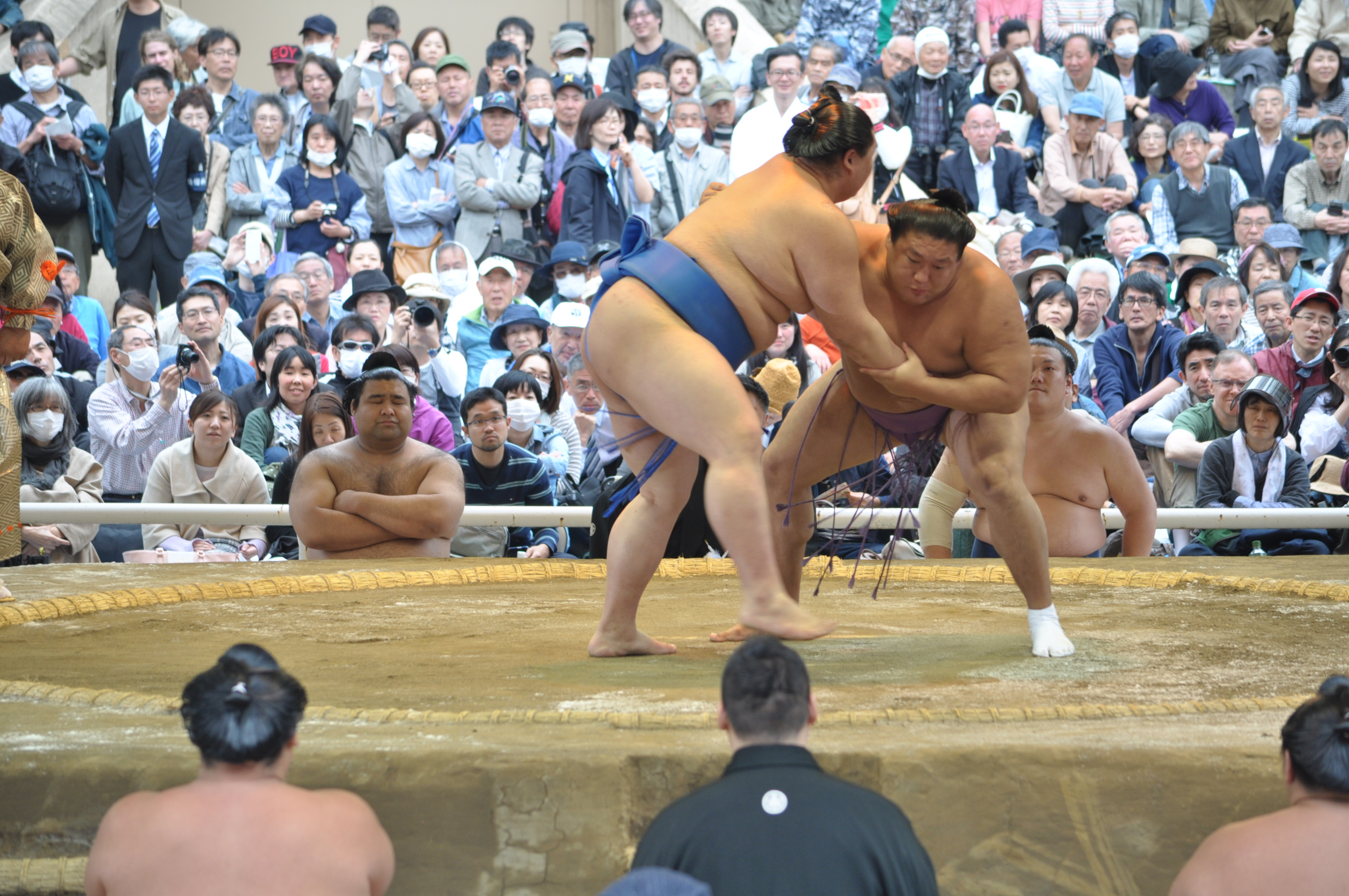 貴ノ岩 義守